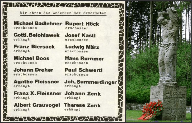 Erinnerungskarte für die Ermordeten der "Penzberger Mordnacht"